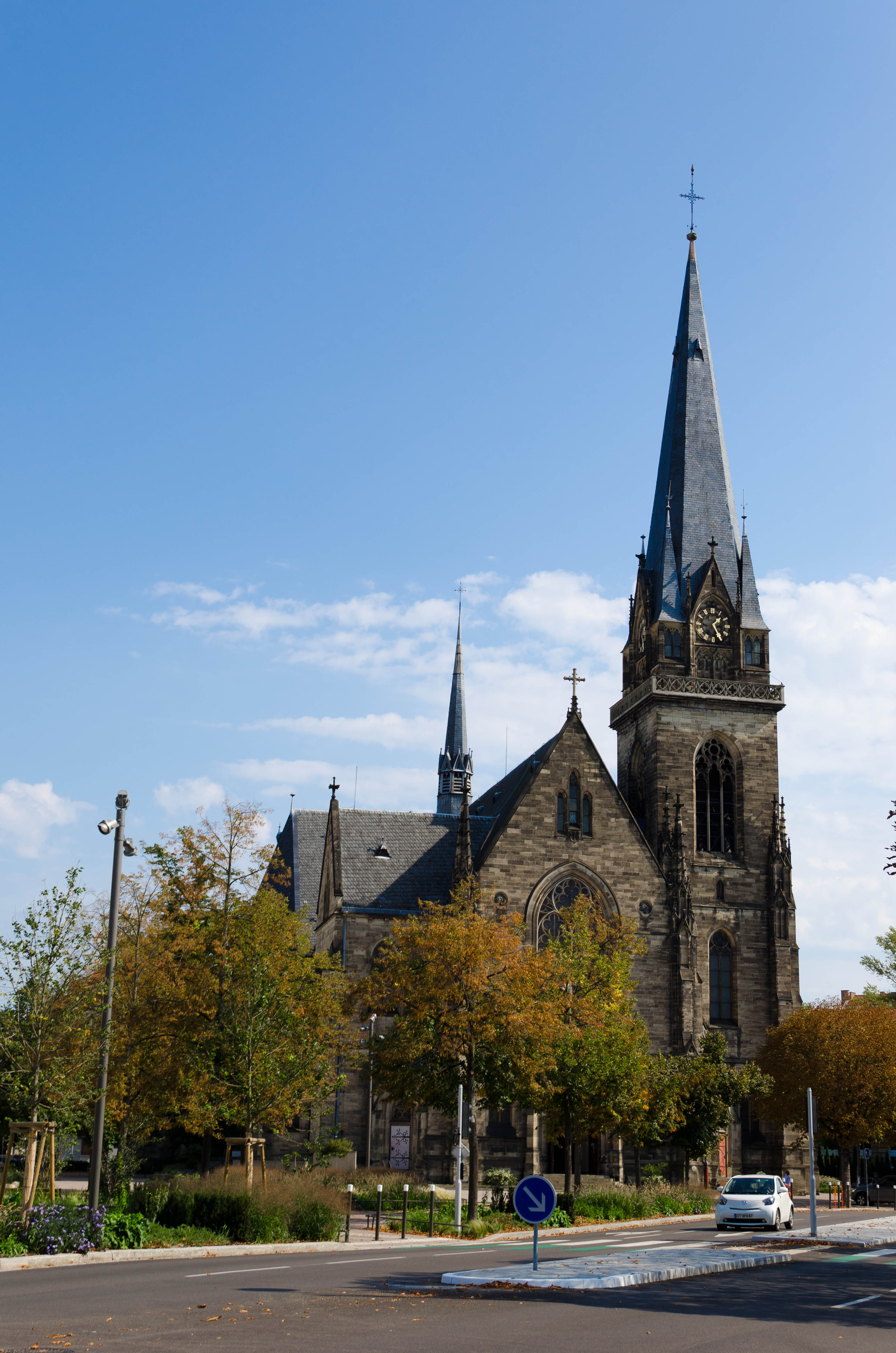 ehemalige katholische Garnisonkirche St. Mauritius in Straßburg, Elsass; erbaut 1893-1899 nach Entwurf des Architekten Ludwig Becker